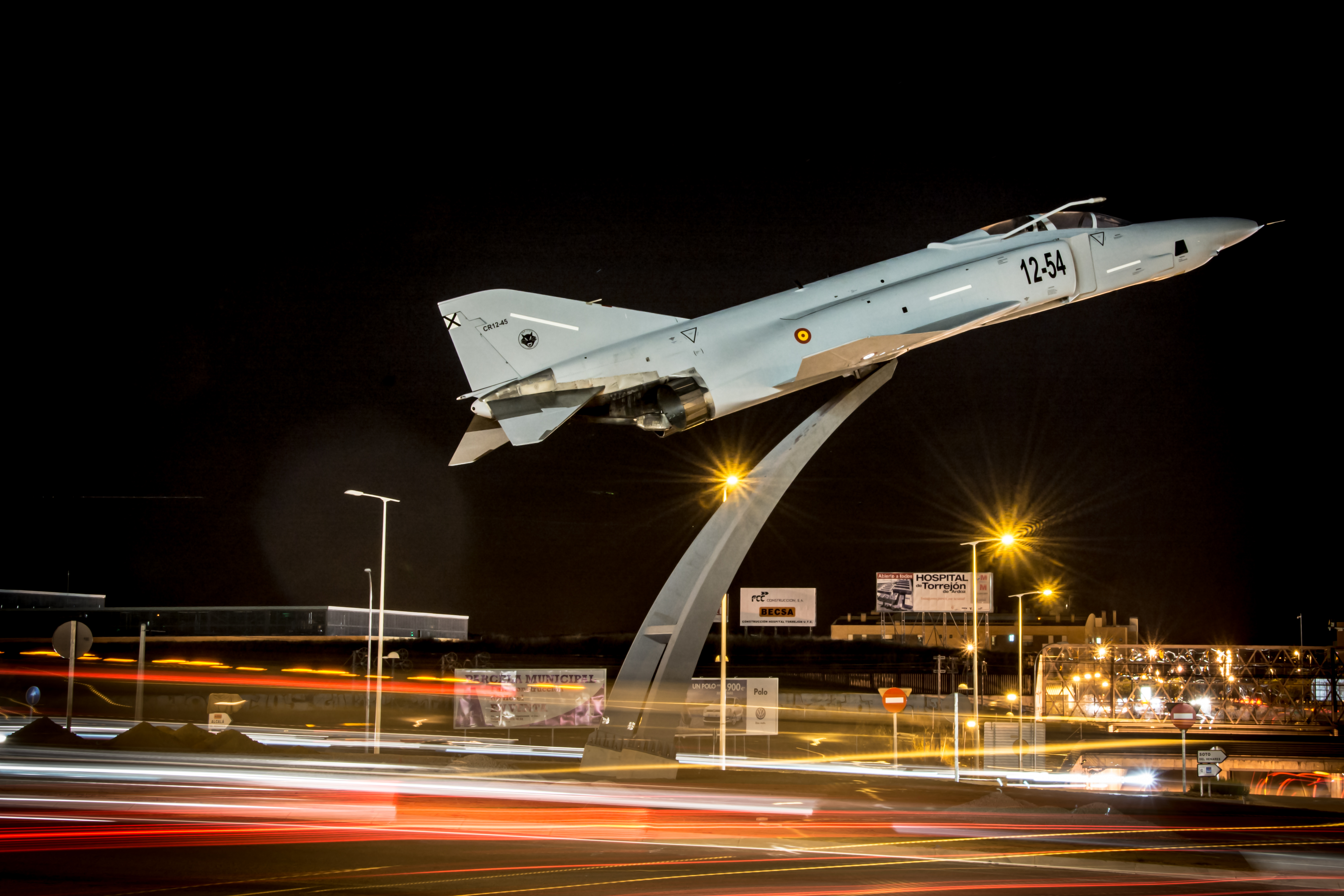 Avión McDonnell Douglas F-4 Phantom II situado en la avenida de la constitución de Torrejón de Ardoz